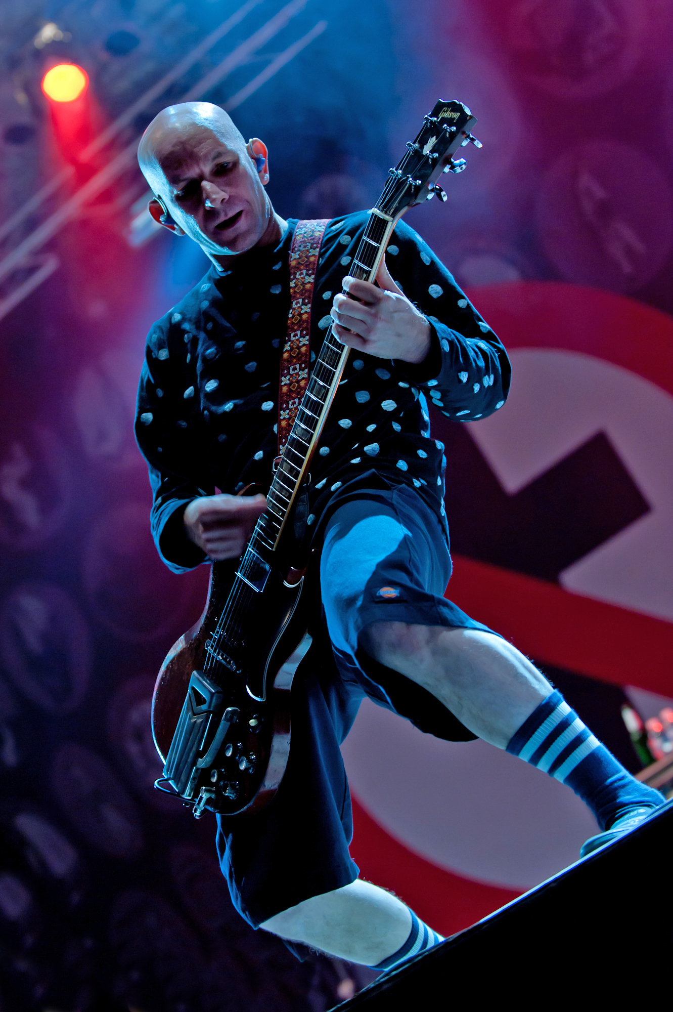 Greg Hetson beim Festival Rocco del Schlacko, als Gittarist von Bad Religion.